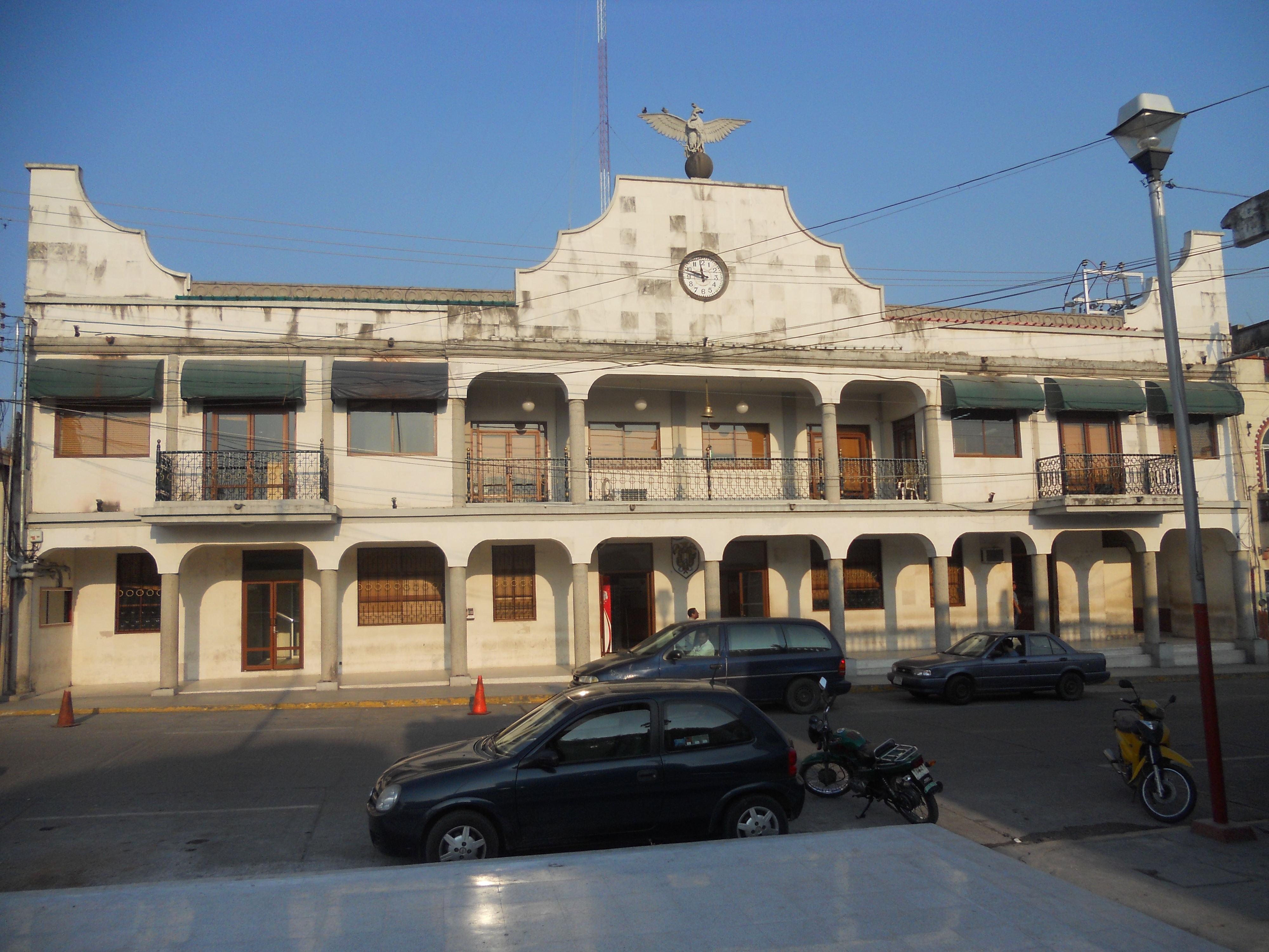 Toma de frente del palacio municipal de Tierra Blanca, Veracruz, México